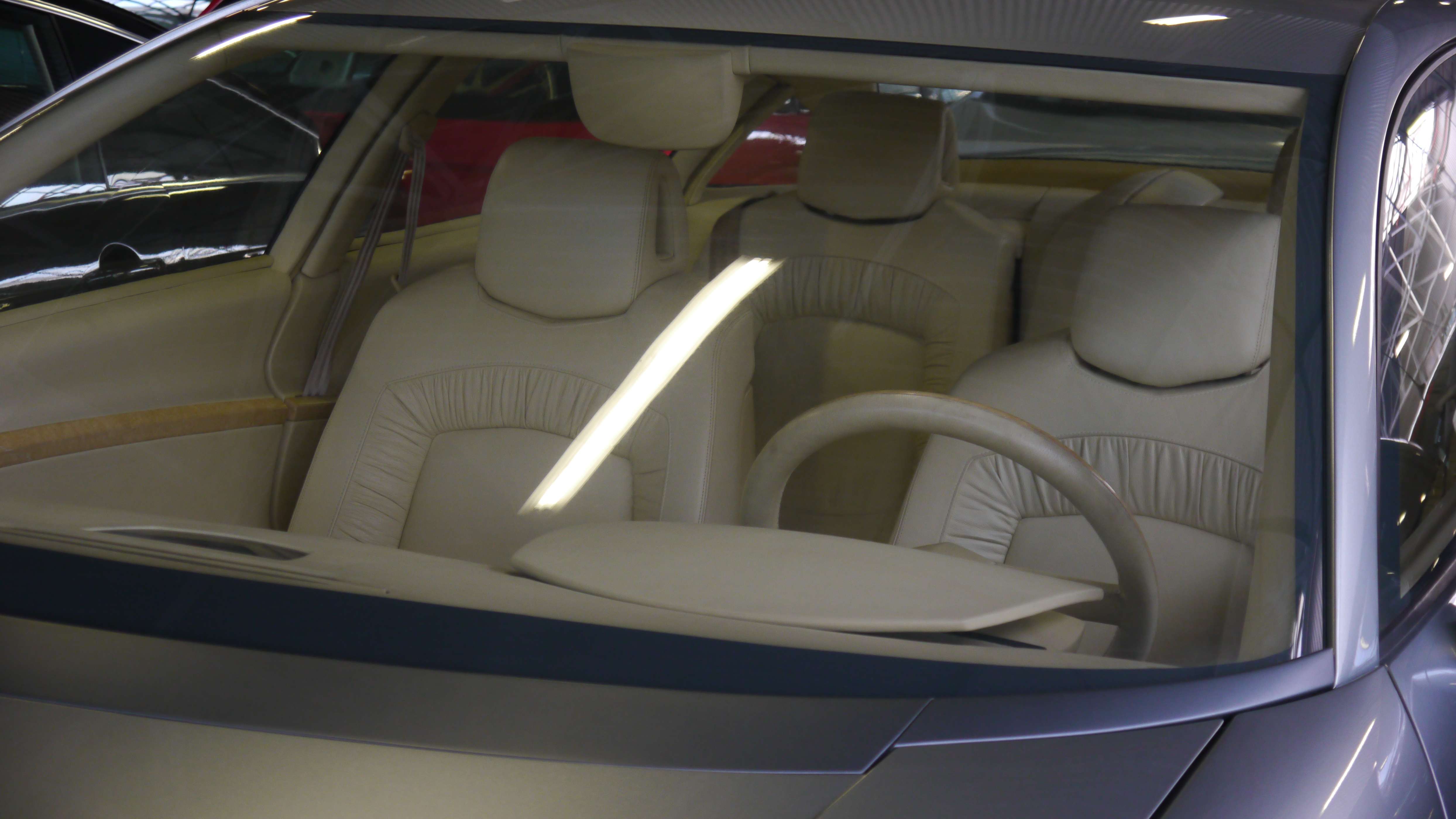 Conservatoire Citroen 229 Citroen Lignage